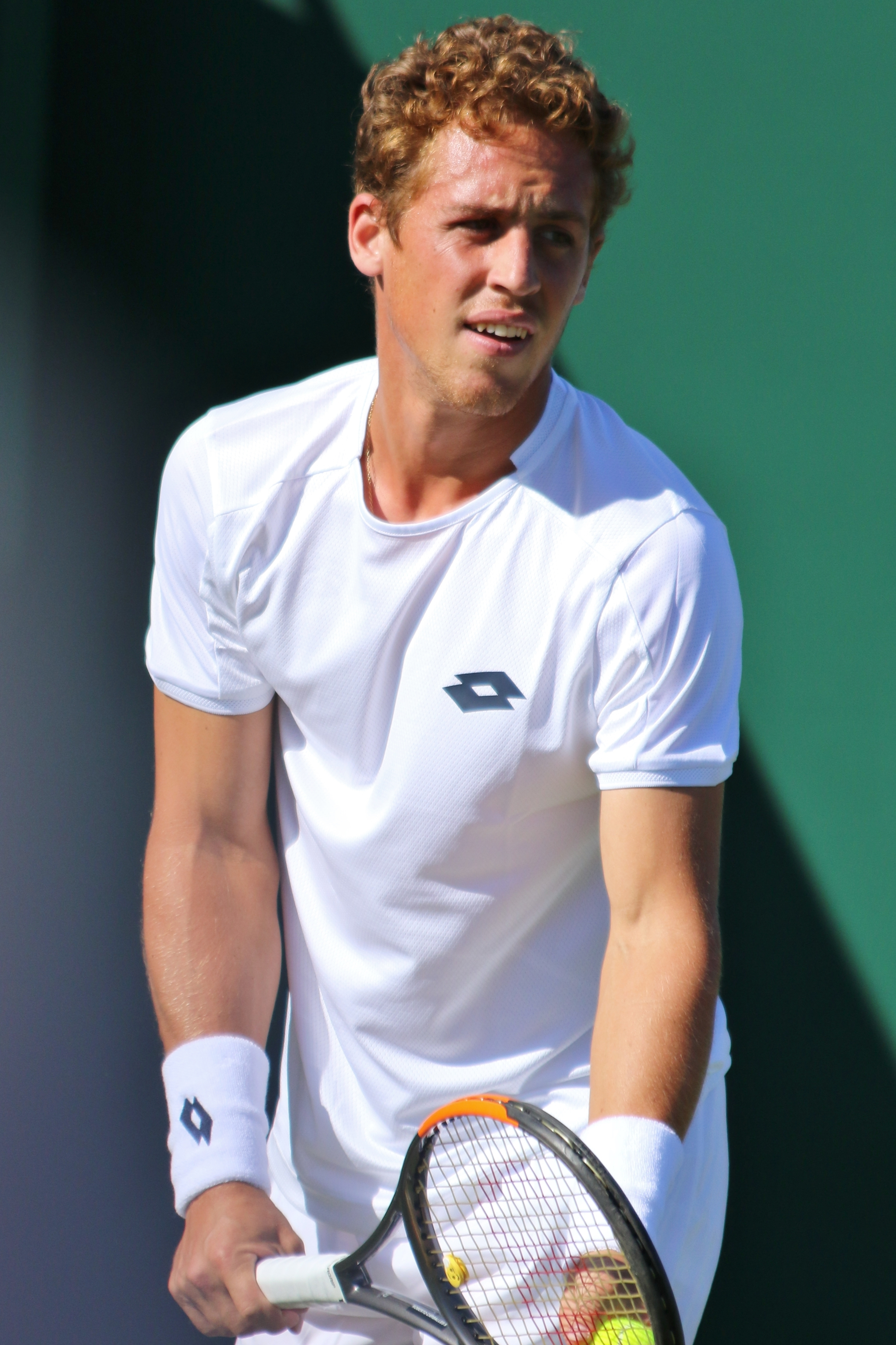 Carballes Baena WM18 (1)